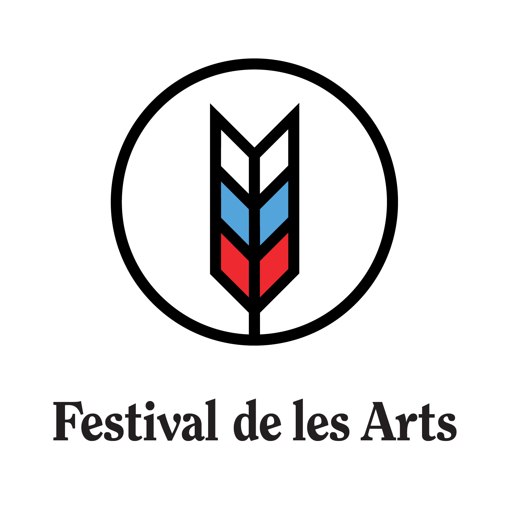 Este es el logotipo de Festival de les Arts. Se trata de un restyling que sustituye al logo fundacional de 2014.